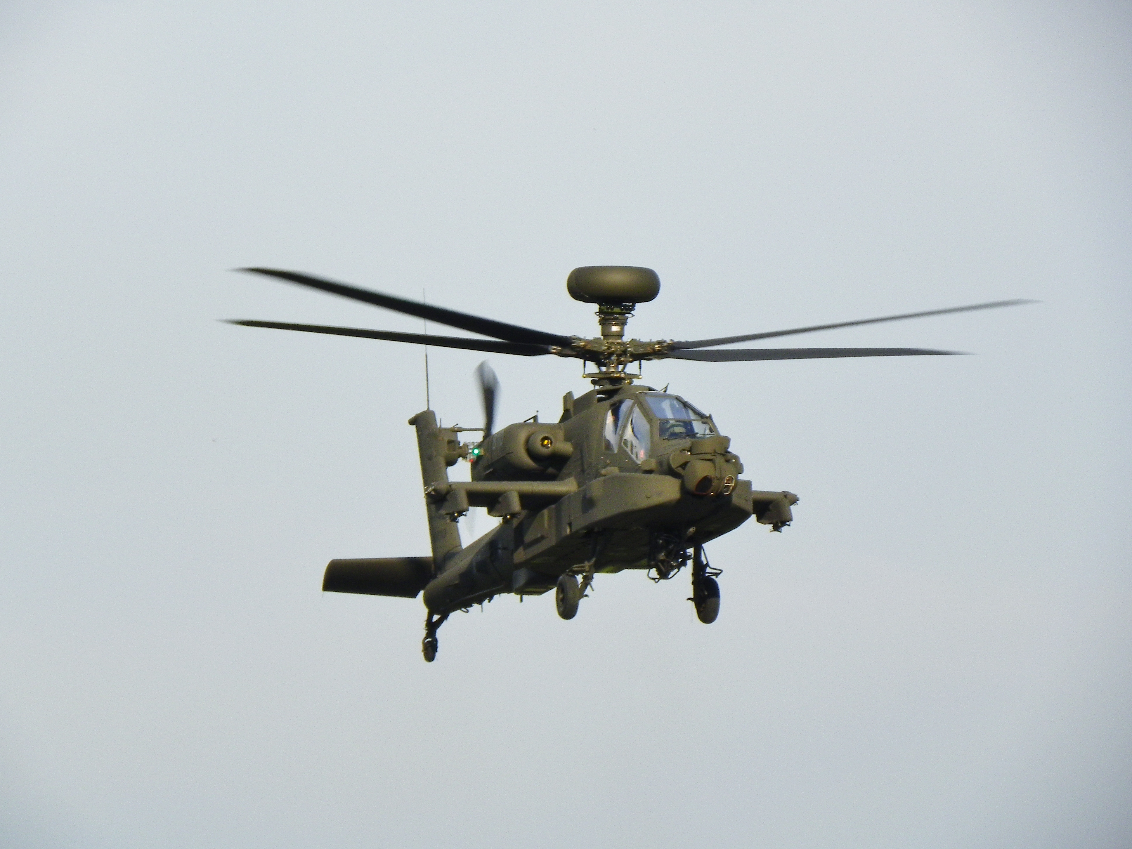 陸軍官校操場上空的陸航AH-64E 810阿帕契攻擊直升機。